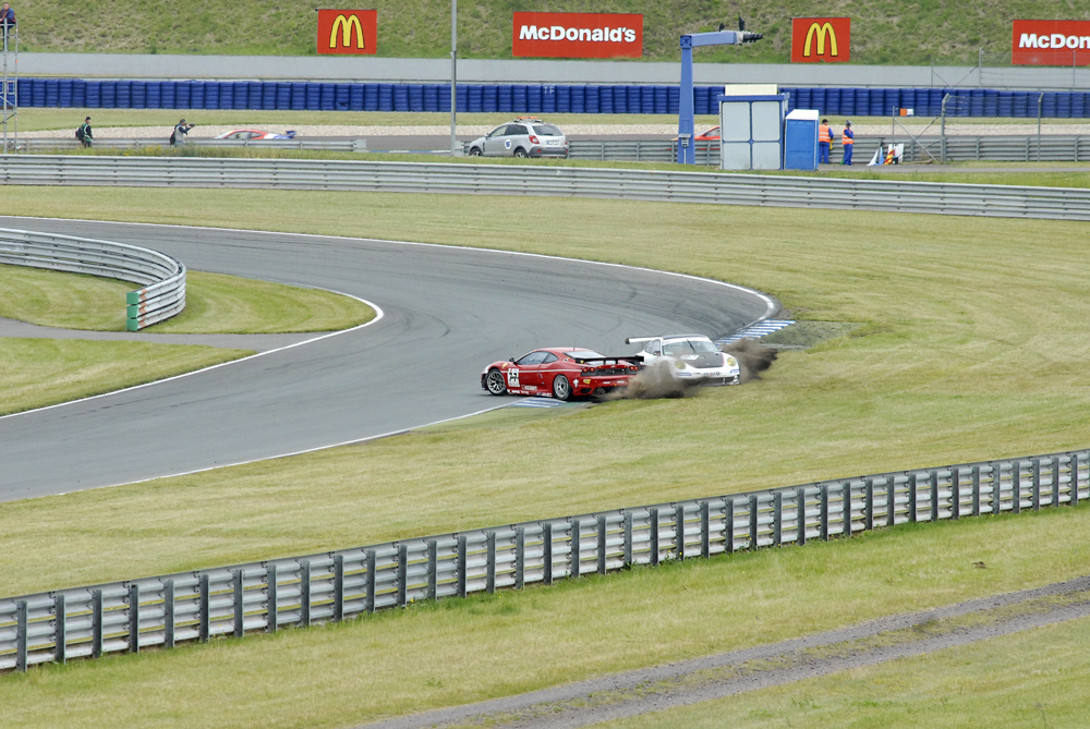 FIA GT Cup 2009, Oscherleben, Crash Ferrari F430-Porsche 911 GT3RS (997)